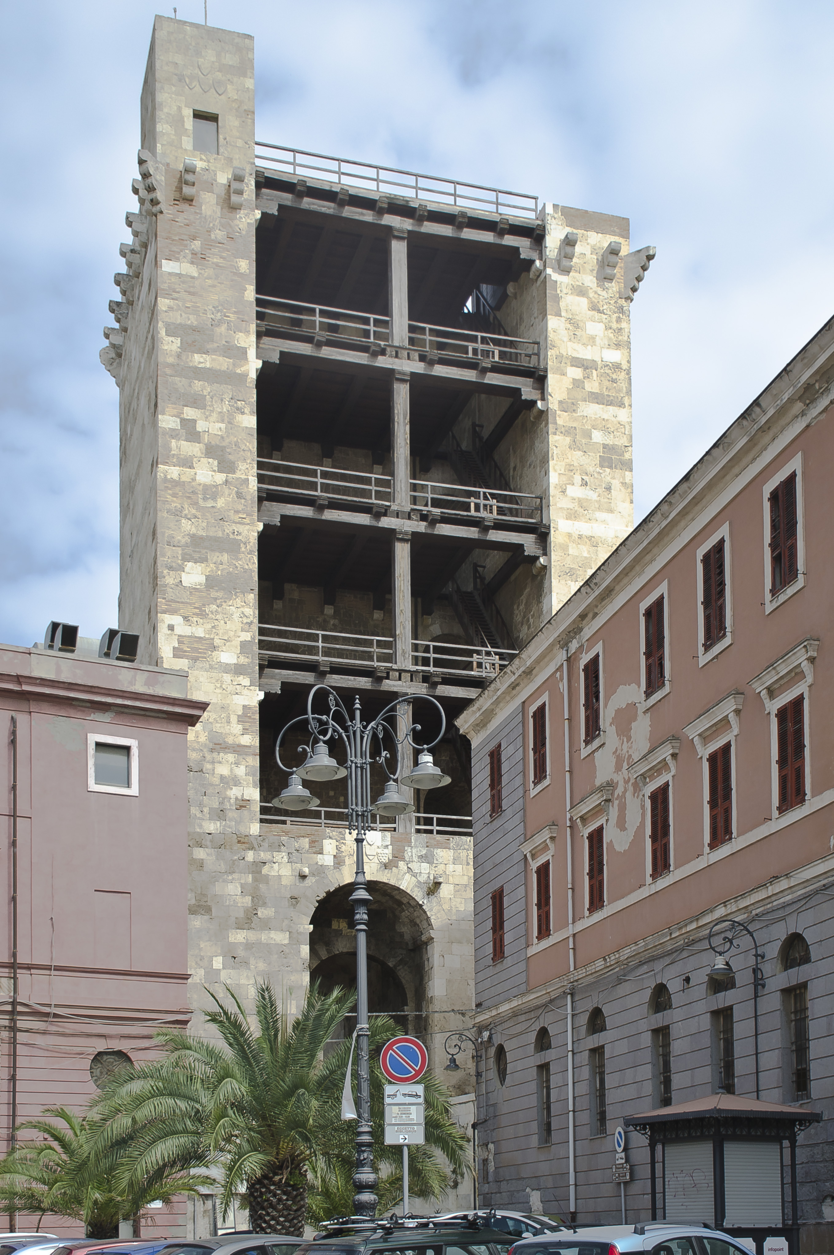 Torre di San Pancrazio, Cagliari, Sardegna